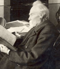 Панаєв Федір Миколайович - радянський кліматолог